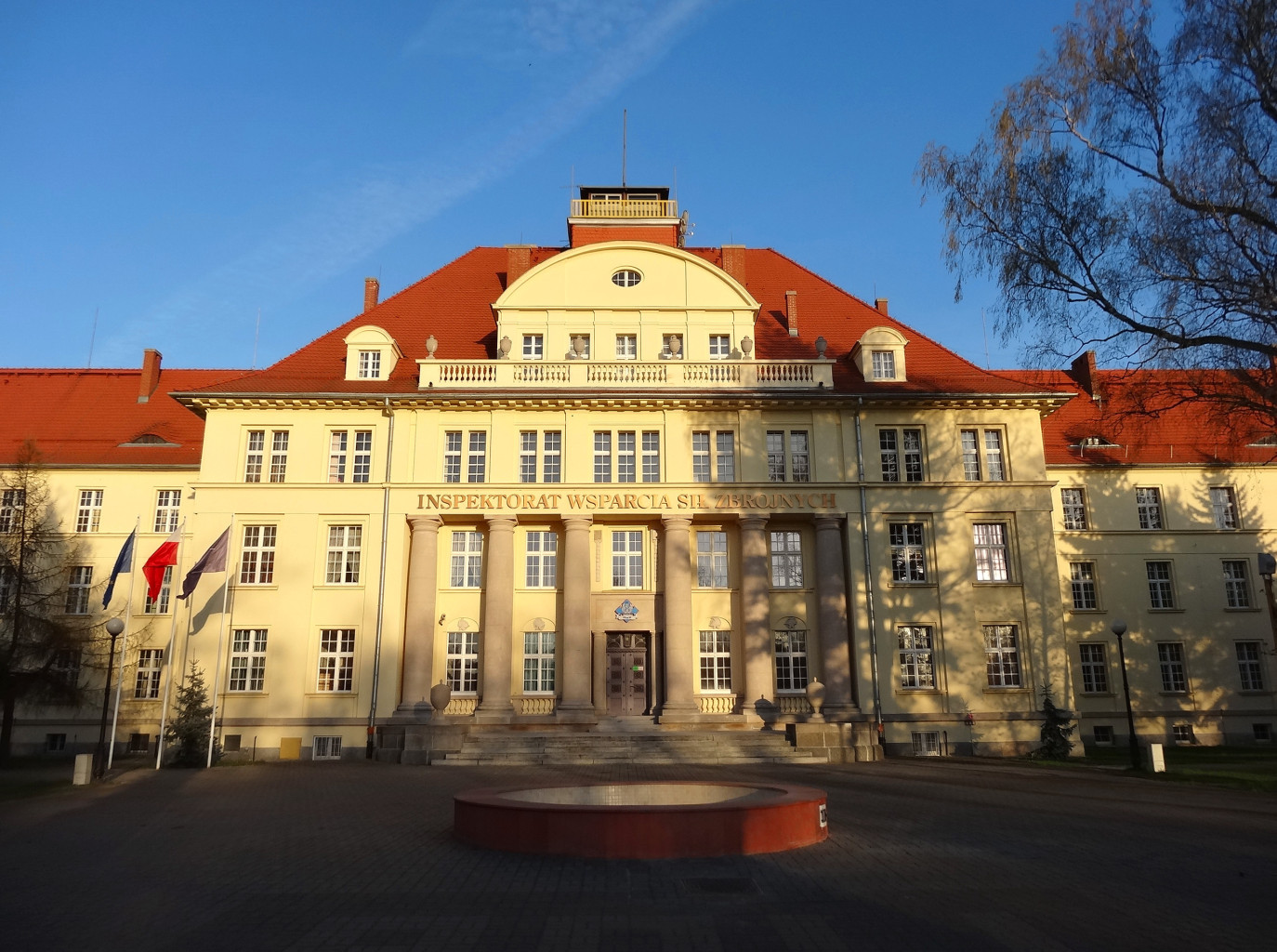 Gmach Inspektoratu Wsparcia Sił Zbrojnych w Bydgoszczy, ul. Gdańska 190, w latach 1945-2007 siedziba dowództwa Pomorskiego Okręgu Wojskowego